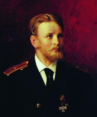 Sergei Alexandrovich Stroganov